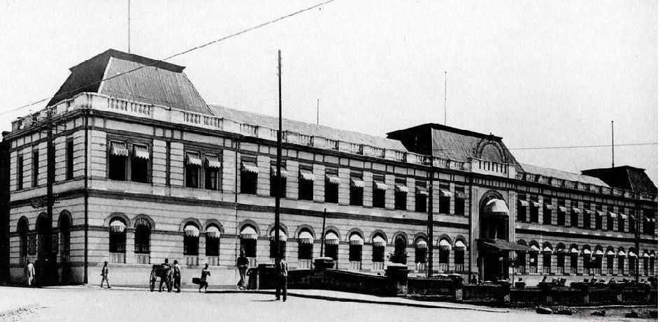 The Grand Hotel of Peking（北京六国饭店）